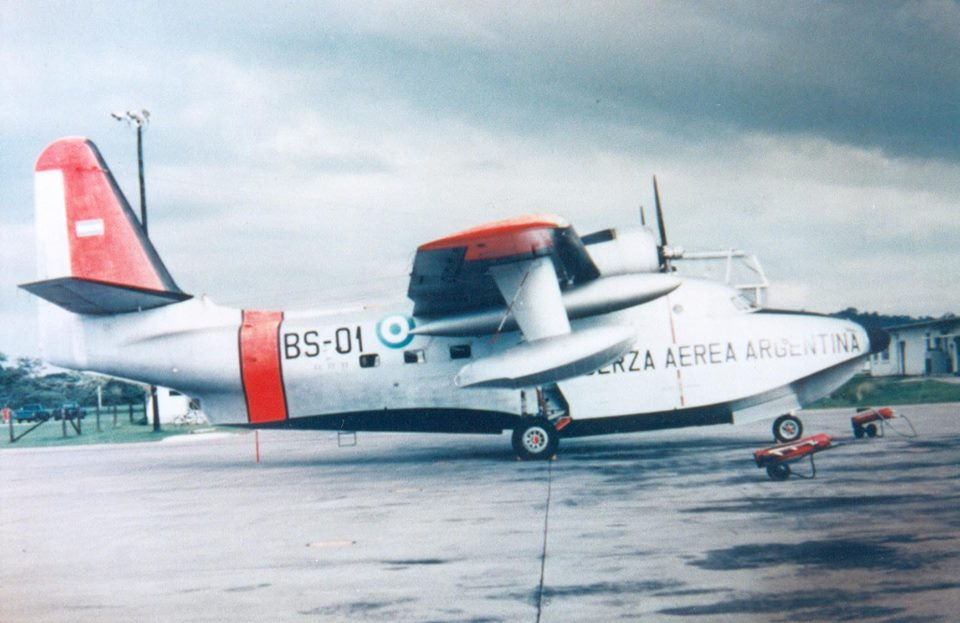 El 23 de diciembre de 1962, arriban a la I Brigada Aérea los anfibios BS-01 y BS-02. Son las primeras aeronaves dedicadas con exclusividad a las tareas de búsqueda y salvamento. Las tripulaciones estaban integradas por los comandantes Roberto Temporini y Rolando L. Abdala; tenientes José M. Pérez y Rubén O. Moro; suboficiales mayores Carlos W. Vera y Alcides Z. López; suboficiales principales Ramón A. Barberis y Oscar R. Giovannetti; y suboficial ayudante Alfredo Wirszeker